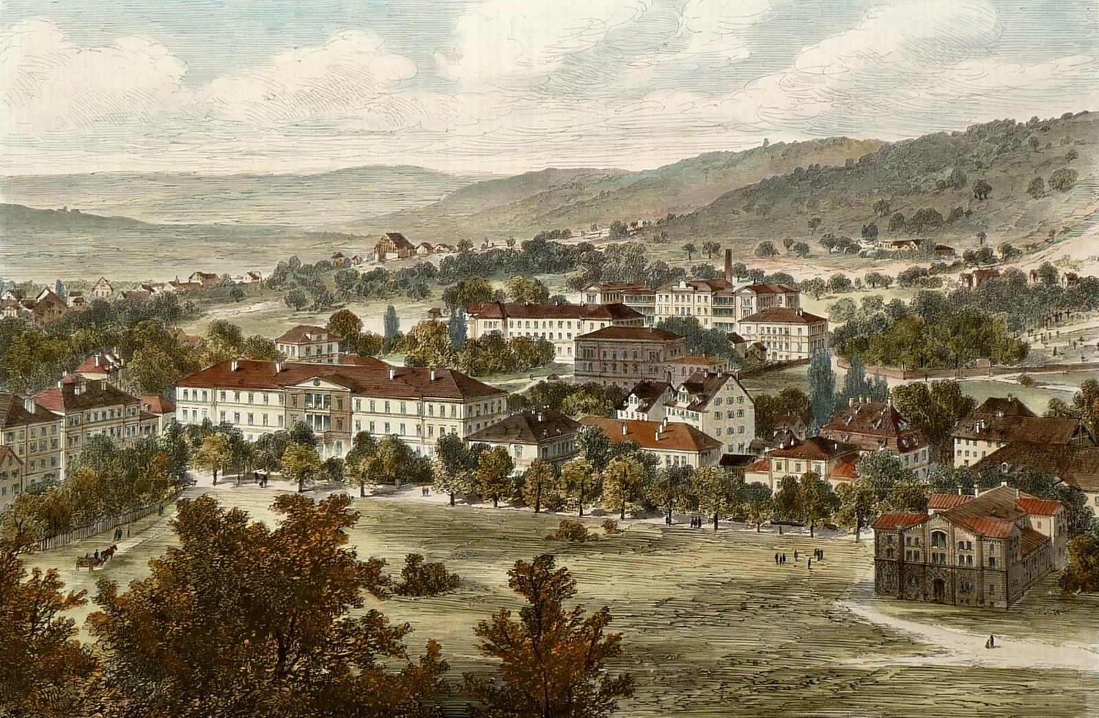 Tübinger Universitätsviertel zum 400-jährigen Jubiläum der Universität. (Holzstich koloriert 23,4 x 35,3 cm (Bild); 26 x 37,2 cm (Blatt)) Der Holzstich zeigt folgende Gebäude der Universität Tübingen: die Augenklinik, das Botanische Institut, die Neue Aula, die Chirurgische Klinik, das Physiologische Institut, die Medizinische Klinik, das Pathologische Institut, die Turnhalle und das Reithaus.